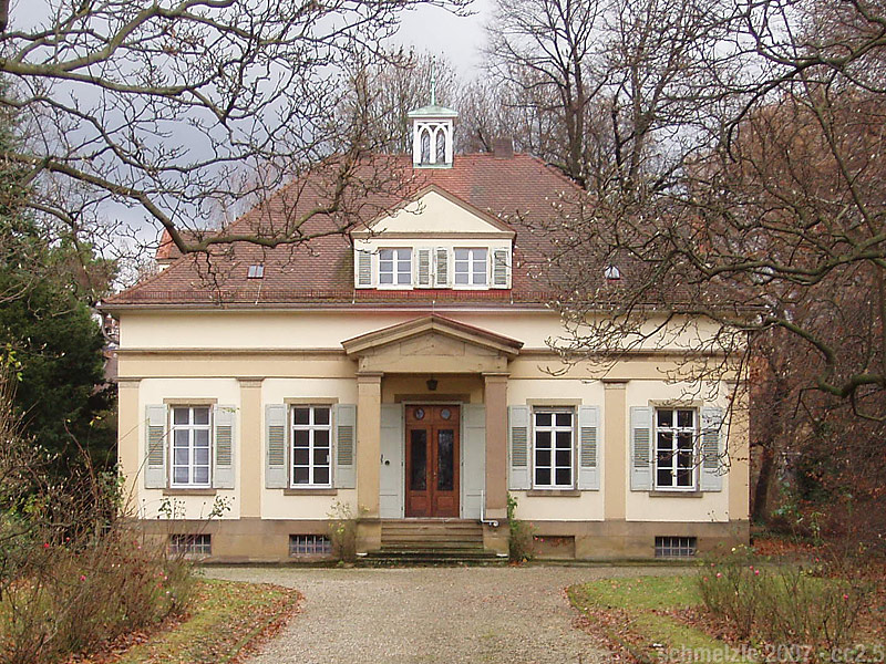 Villa Rauch in der Steinstr.1 in Heilbronn